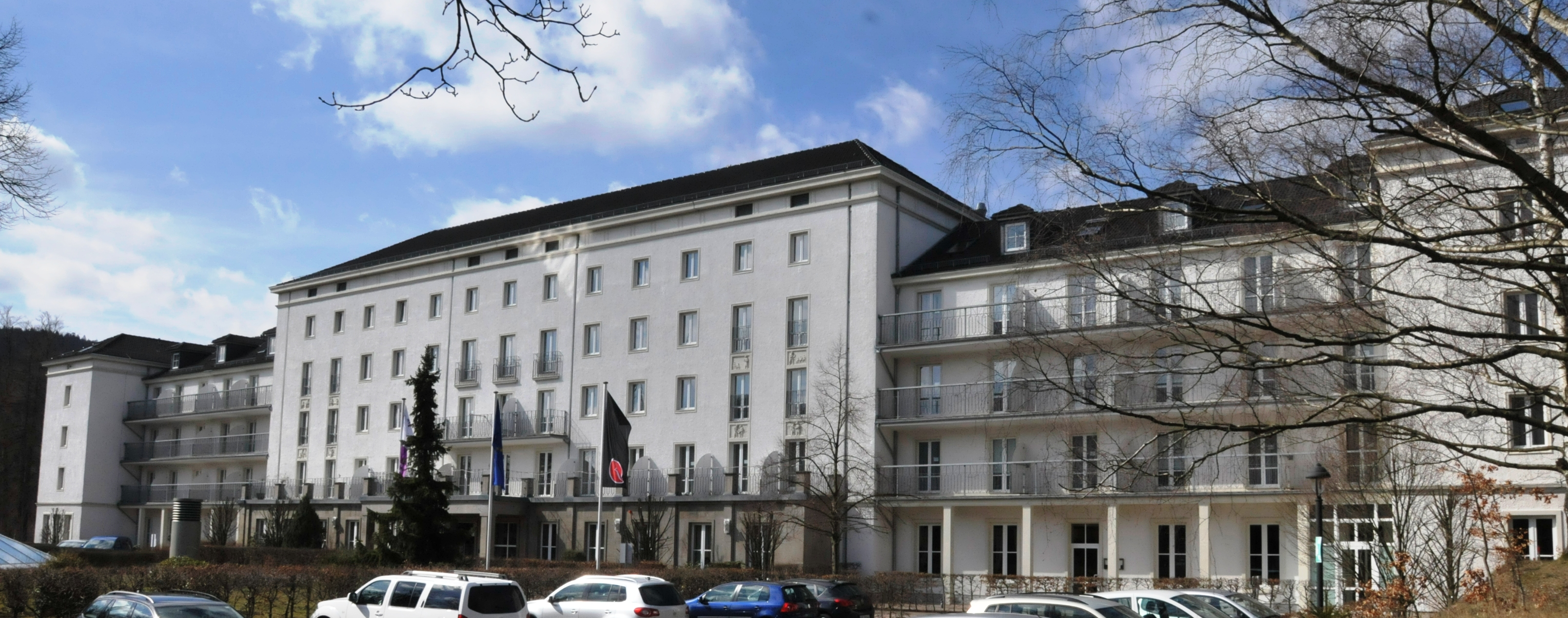 Friedrichroda, Burchardtsweg 1